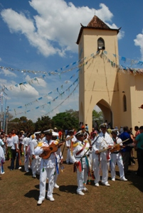 Guarda de Congo de Nossa Senhora do Rosário - Lapinha (fonte: acervo Prefeitura Municipal de Lagoa Santa)